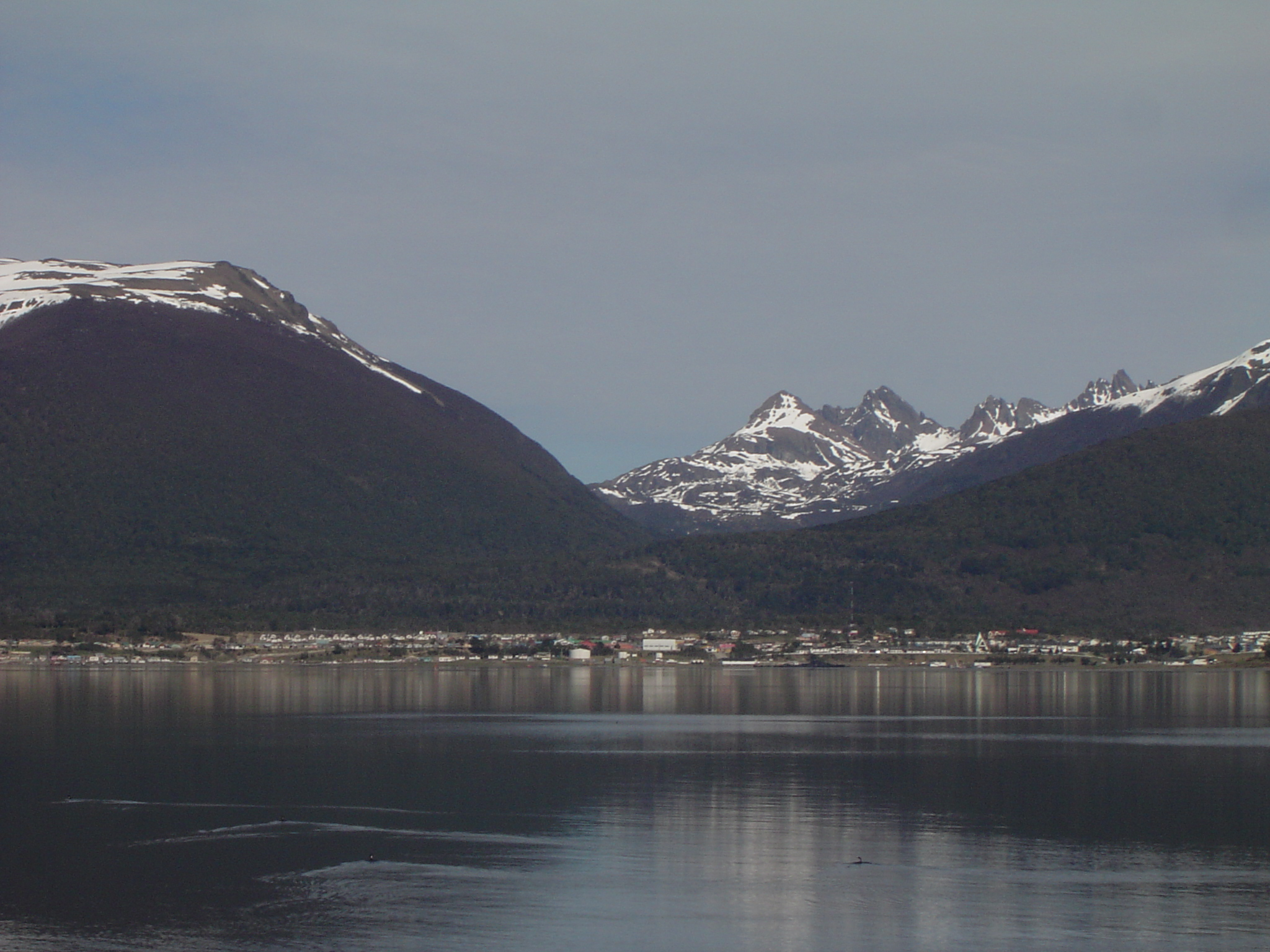 Puerto Williams desde el Canal Beagle. Al fondo, los Dientes de Navarino